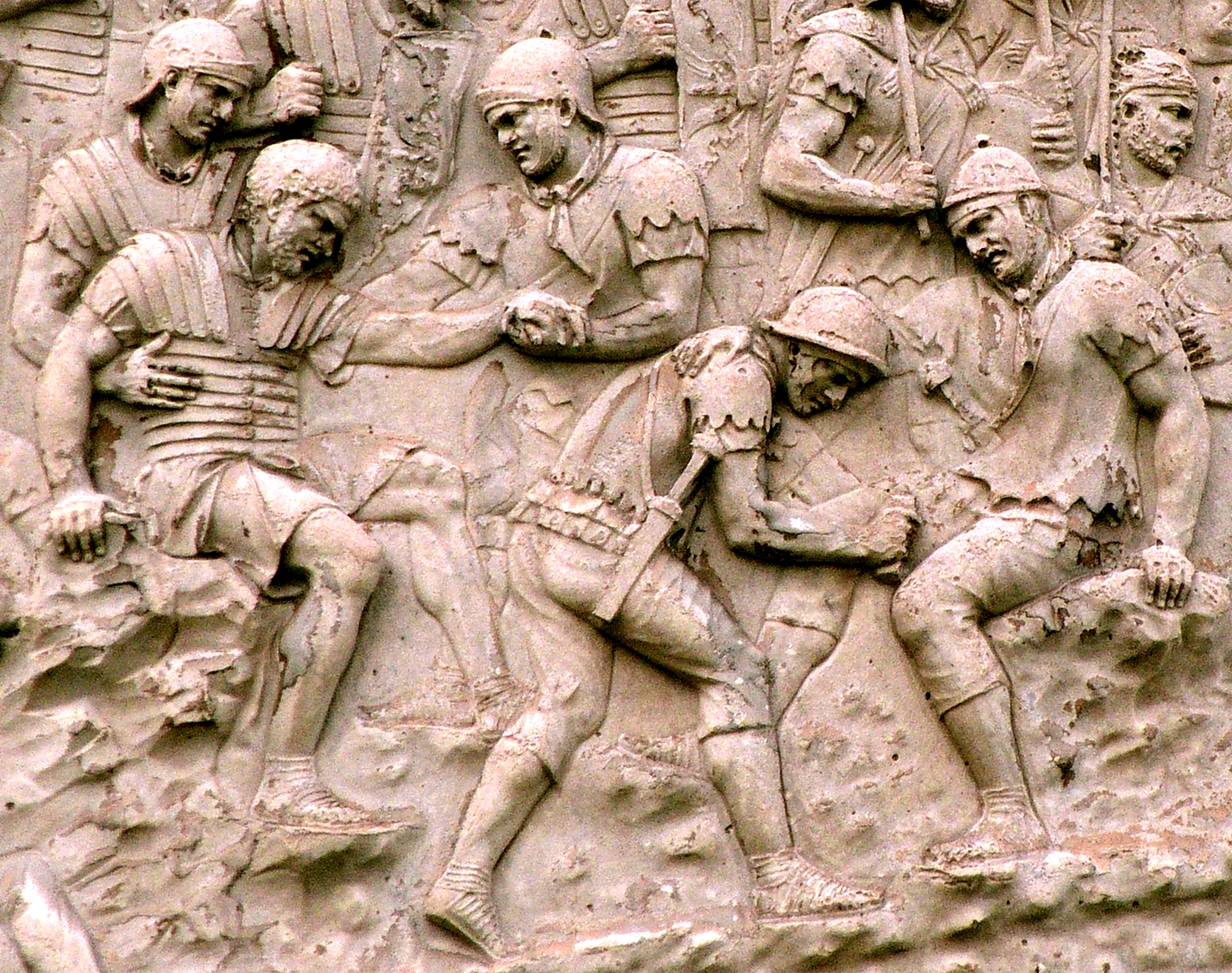 Capsarius versorgt einen Soldaten. Detailausschnitt aus der Trajansäule